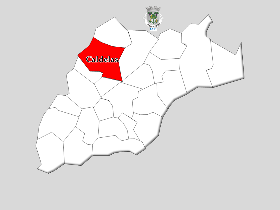 Censo 2011